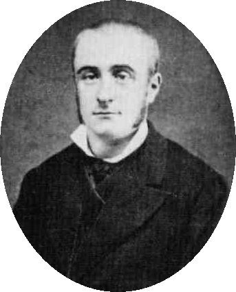 Photographie d'Ernest Delahaye, origine et auteur inconnue, vers 1900.